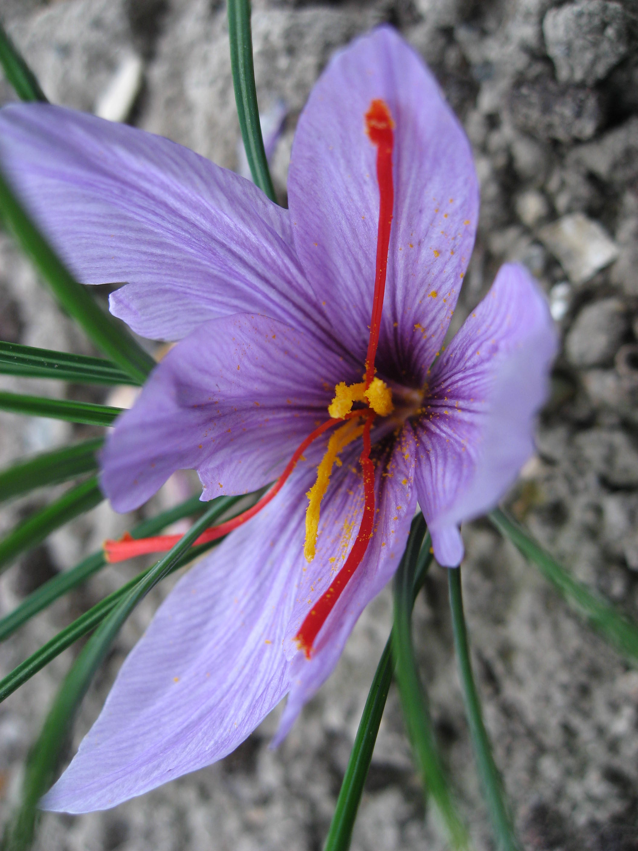 Crocus sativus in Conservatoire National des Plantes à Parfum Map: 48° 23' 49" N 2° 28' 45" E